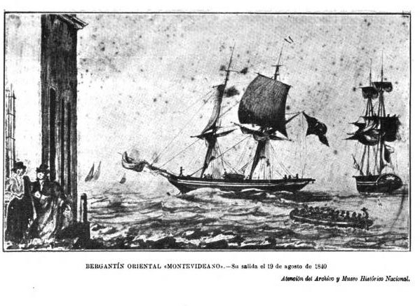 Salida del bergantín oriental Montevideano, 19 de agosto de 1840